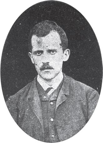 Пере Тошев.